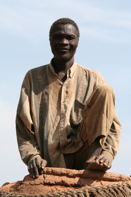 Somba in Benin